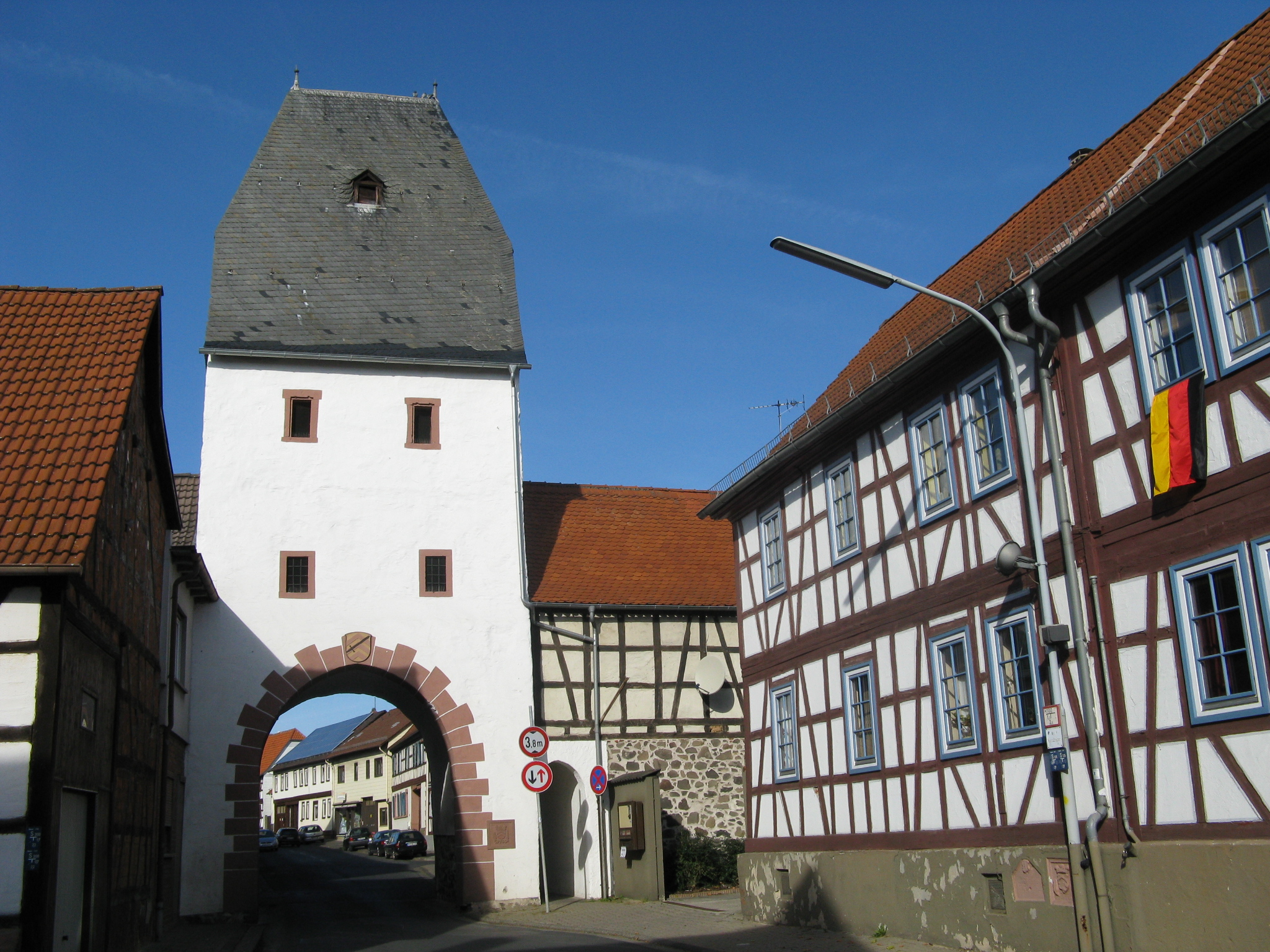 Marköbel, Lower Town Gate, Wetterau/Germany